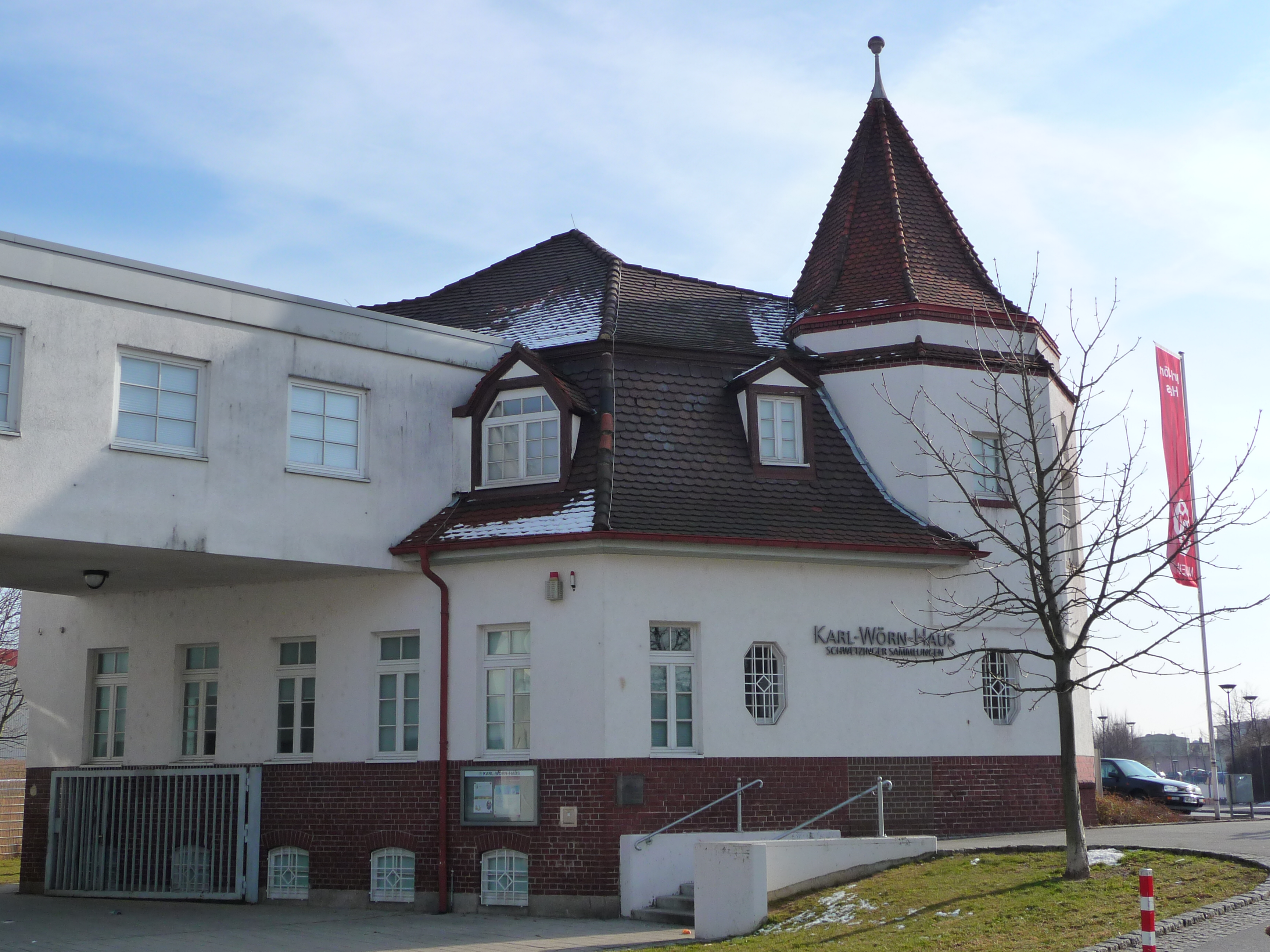 Karl-Wörn-Haus, Schwetzinger Sammlungen, in Schwetzingen (Rhein-Neckar-Kreis)